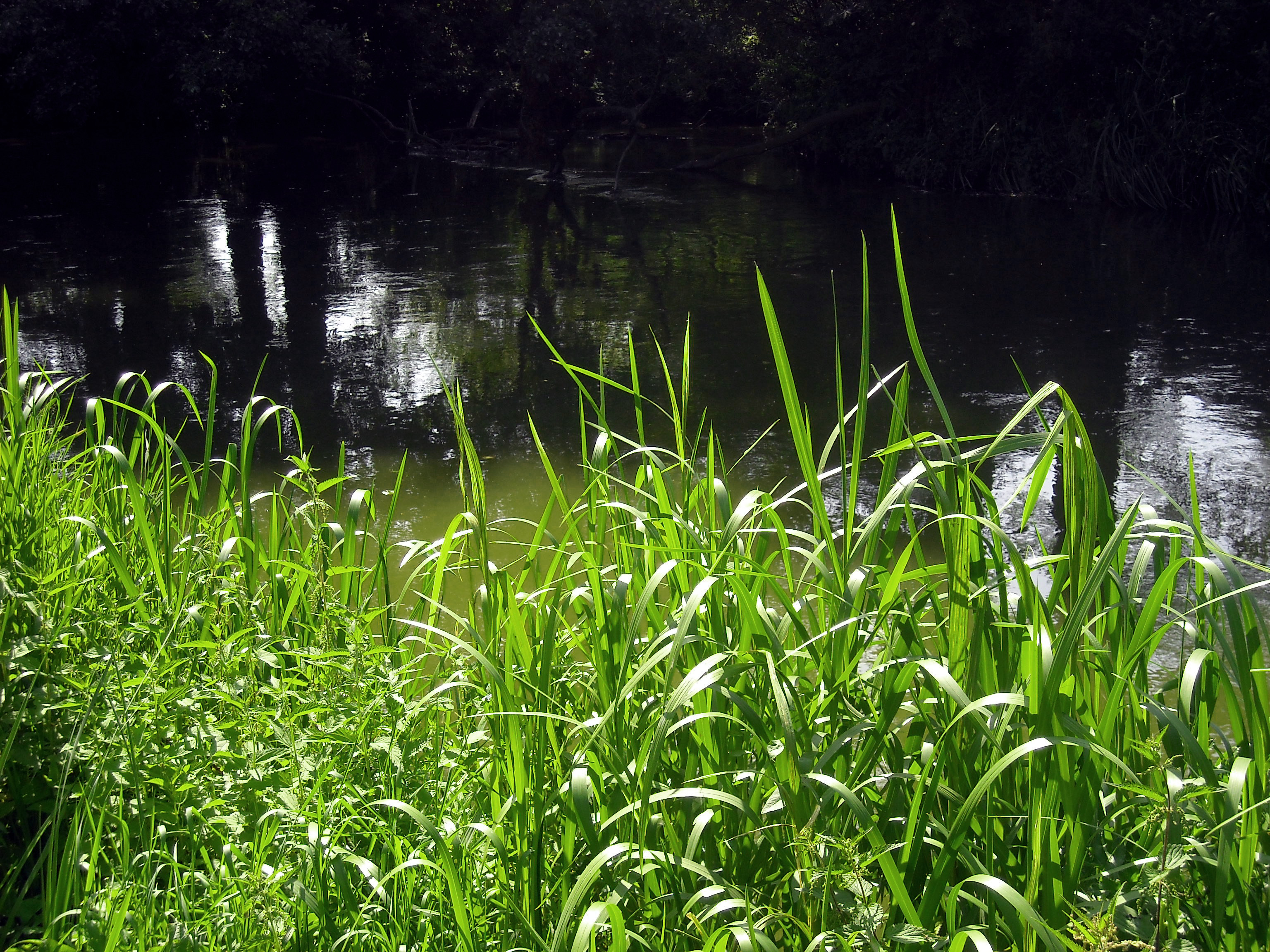 Widok na rzekę Bystrzycę (dopływ Wieprza) z brzegu nieopodal mostu przy ul. Romera